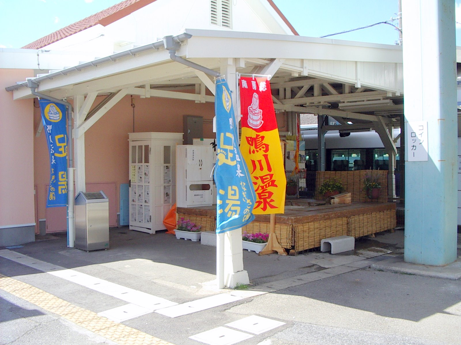 東日本旅客鉄道外房線、内房線安房鴨川駅にかつて存在した足湯。